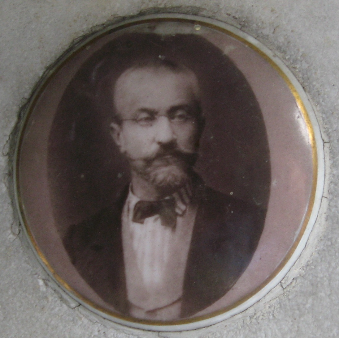 Philipp Sarlay Portrait